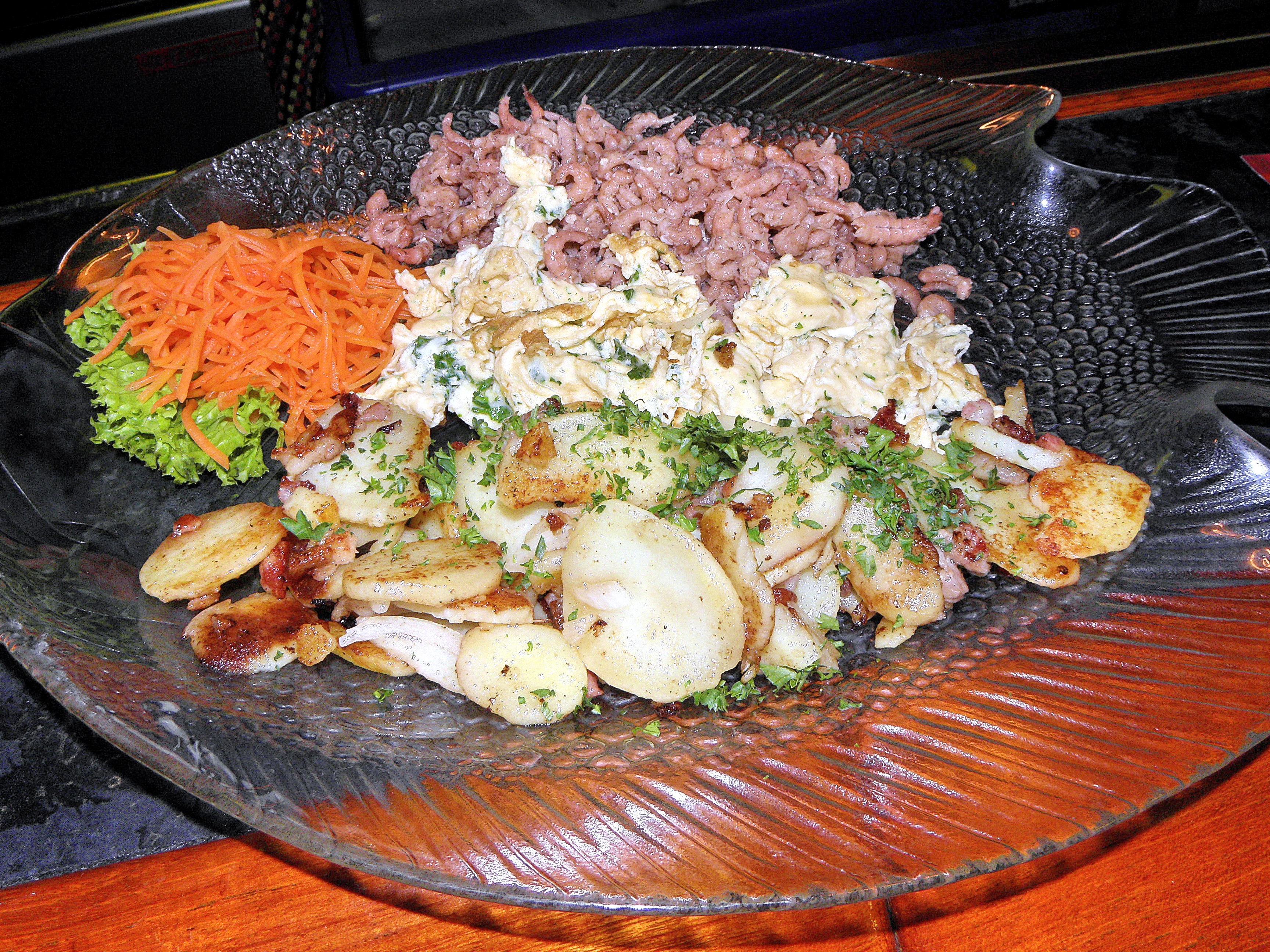 „Fischerfrühstück“, bestehend aus Bratkartoffeln mit Speck, Rührei und Nordseekrabben, garniert mit gehackter krauser Petersilie sowie mit Möhrensalat auf Salatblatt;hier im Bordrestaurant des Hafenrundfahrt- und Ausflugsschiffs Jan Cux II in Cuxhaven in Niedersachsen, Deutschland.